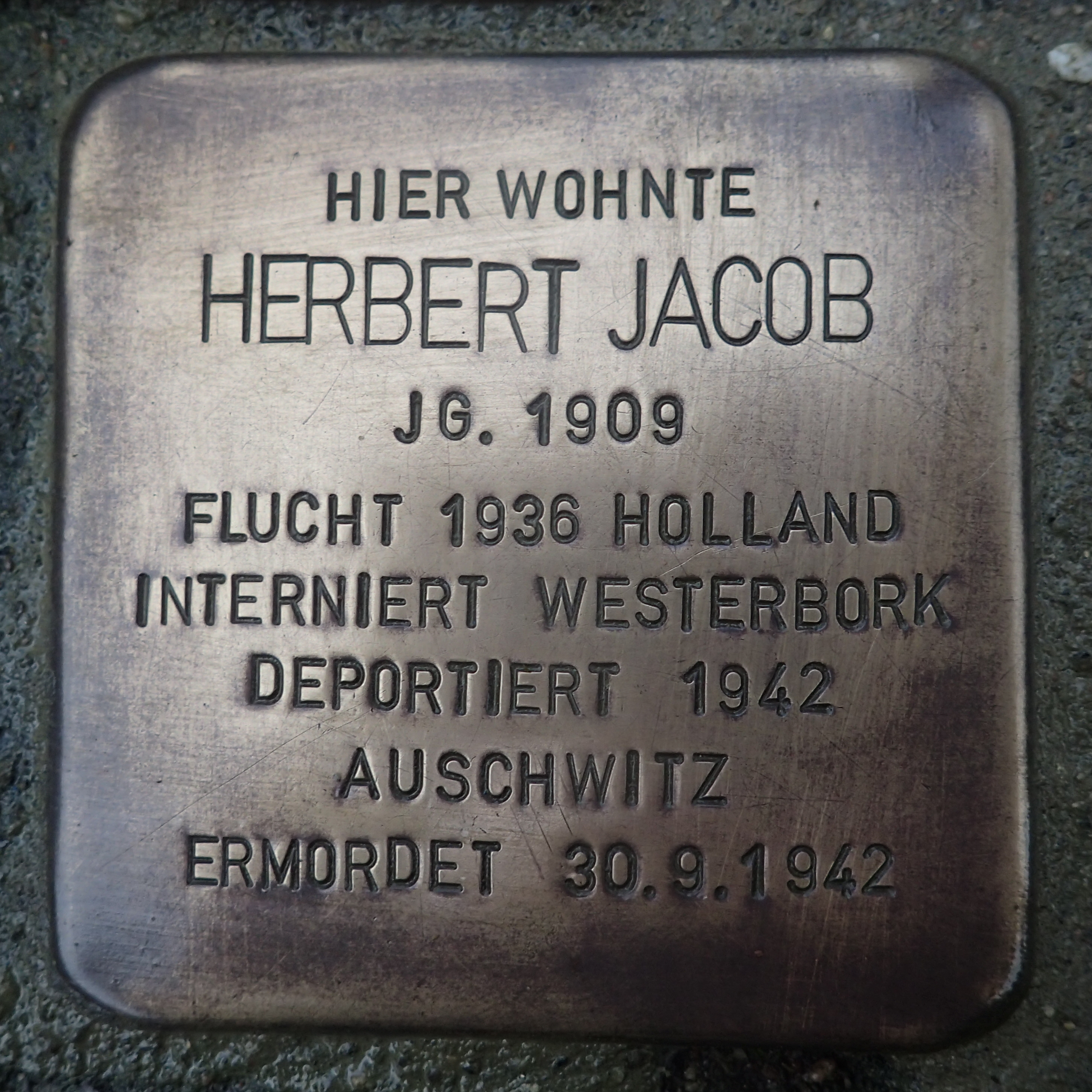 Stolperstein Geldern Gelderstraße 5 Herbert Jacob